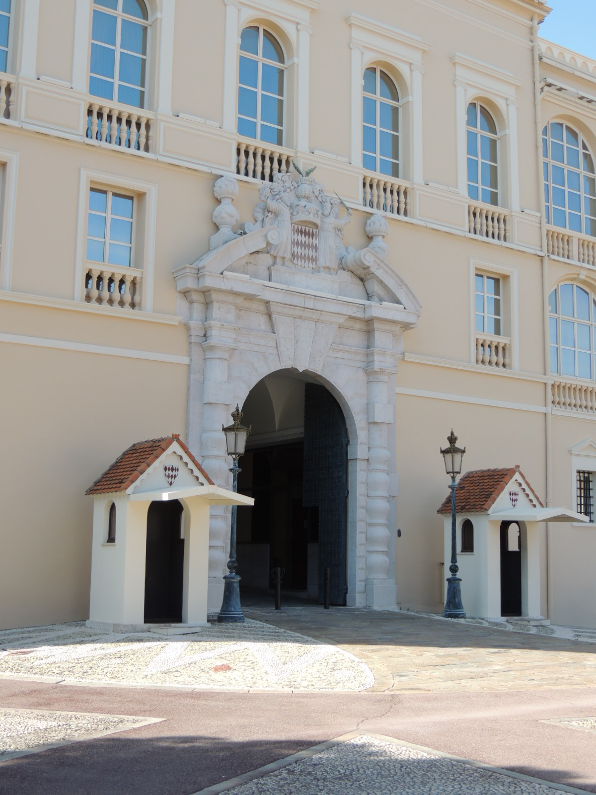 Palais princier monaco